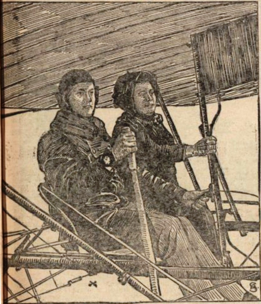 Bruno und Tony Werntgen, deutsche Flugpioniere